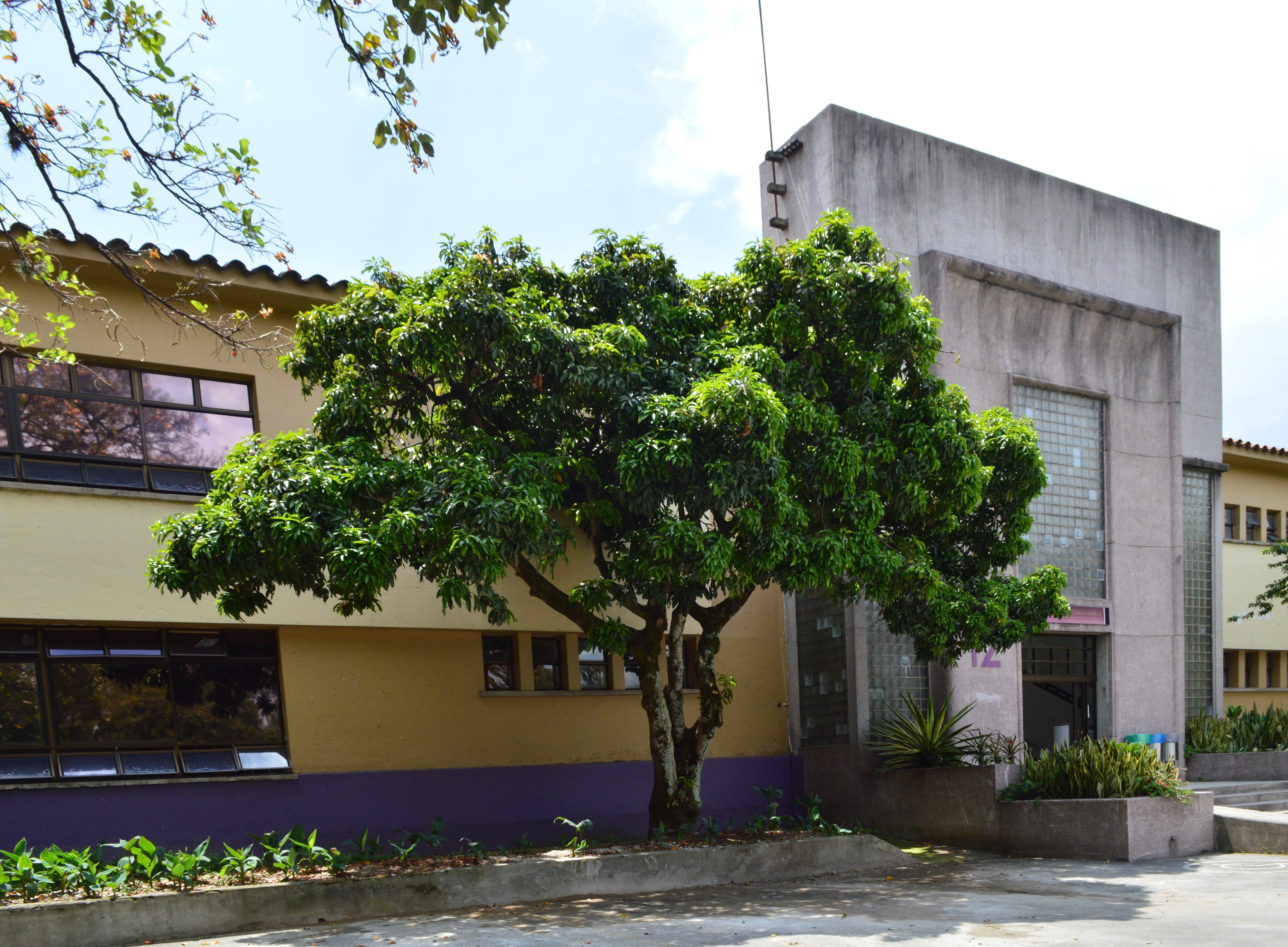 Foto frontal